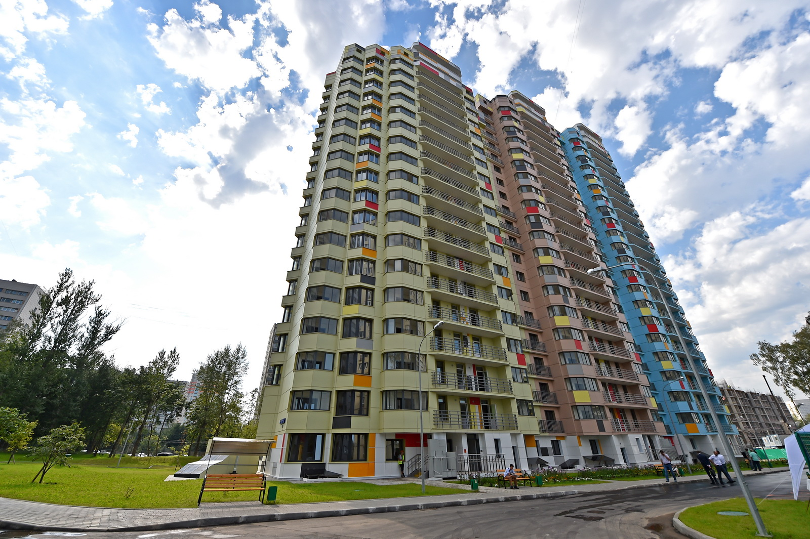 Новый жилой дом на проспекте Вернадского для жителей сносимых пятиэтажек